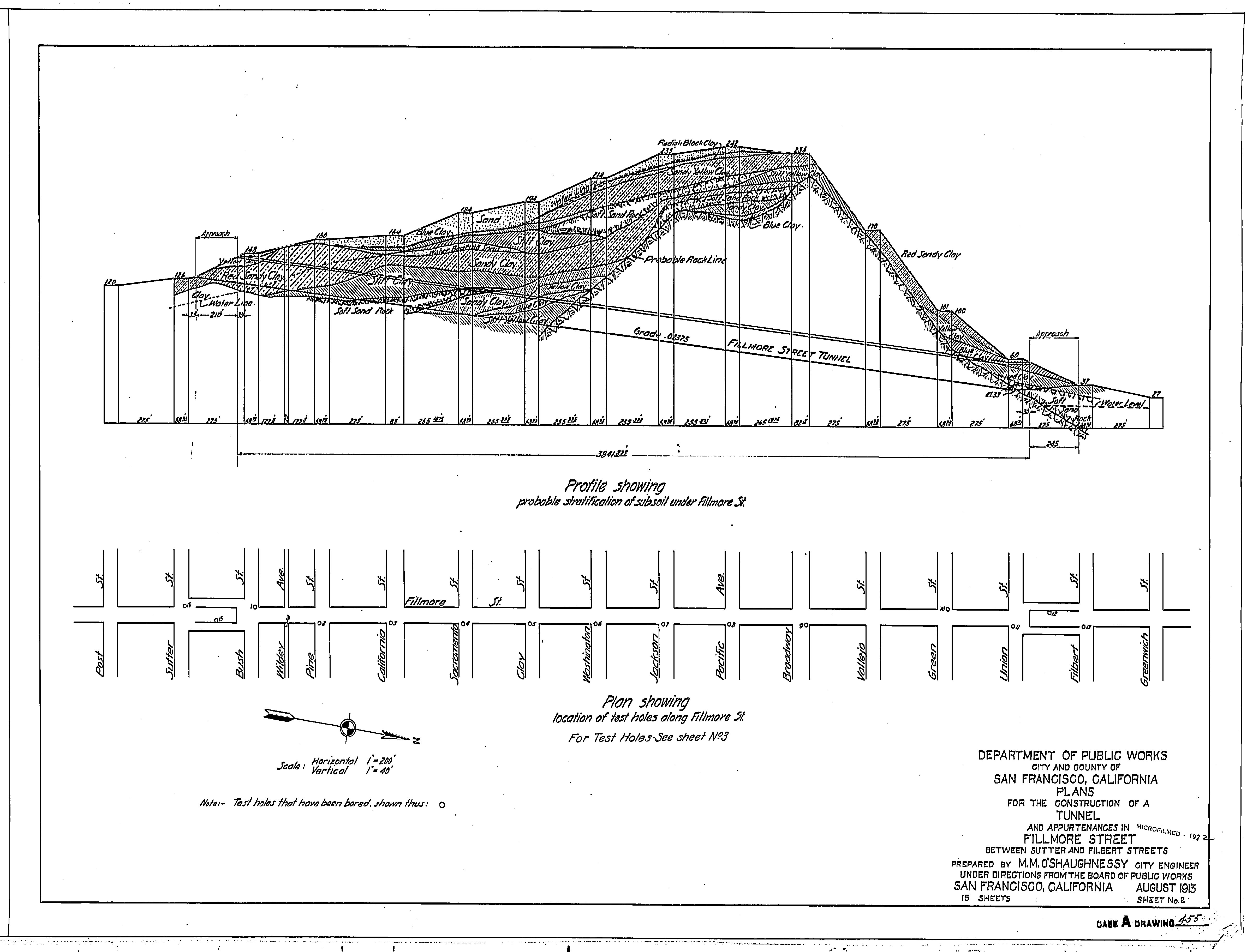 Fillmore Tunnel elevation and geology (1913)